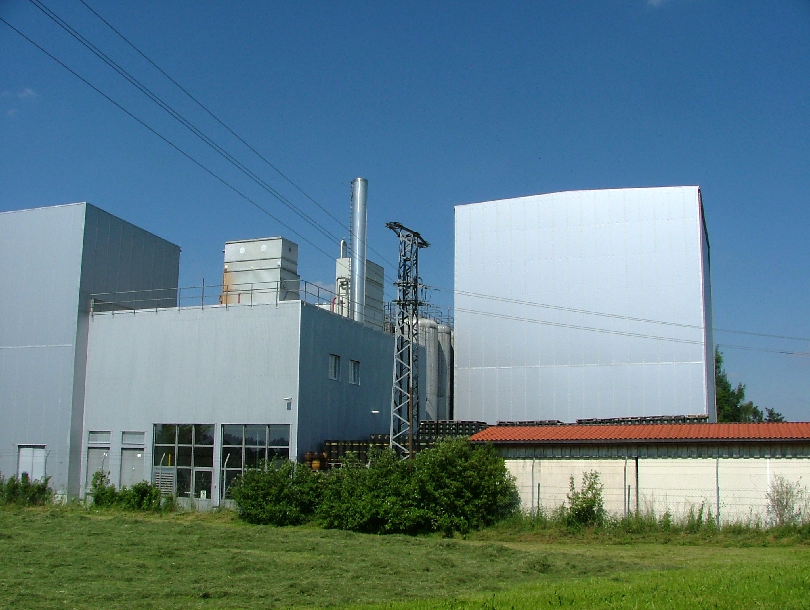 Braustätte des Allgäuer Brauhauses, ehemals Sailerbräu